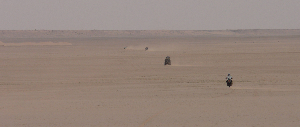 Amsterdam - Dakar: Woestijn van Mauritanie